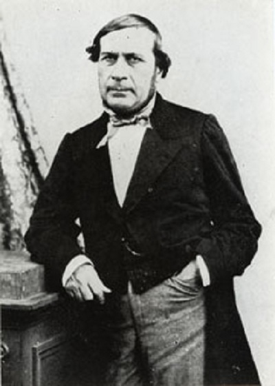 Théogène François Page (né le 31 mars 1807, à Vitry-le-François - mort à Paris, le 2 février 1867), son père était aubergiste. Sorti de l'École Polytechnique, de la même promotion que Rigault de Genouilly, promotion 1827. Prise d'Alger en 1830. Siège de Saint-Jean-d'Ulloa en 1838. Affaire de la Plata en 1840. contre amiral, fut Gouverneur militaire en Indochine Française.